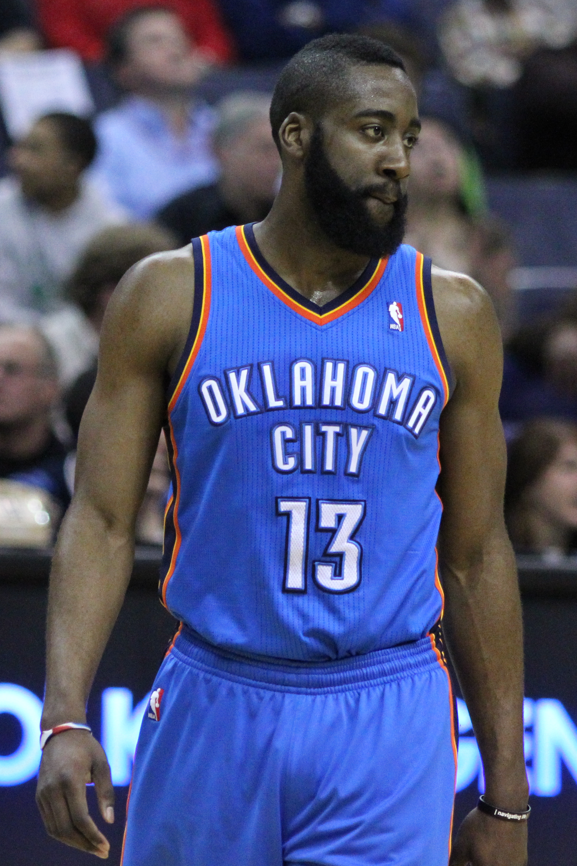 Wizards v/s Thunder 03/14/11